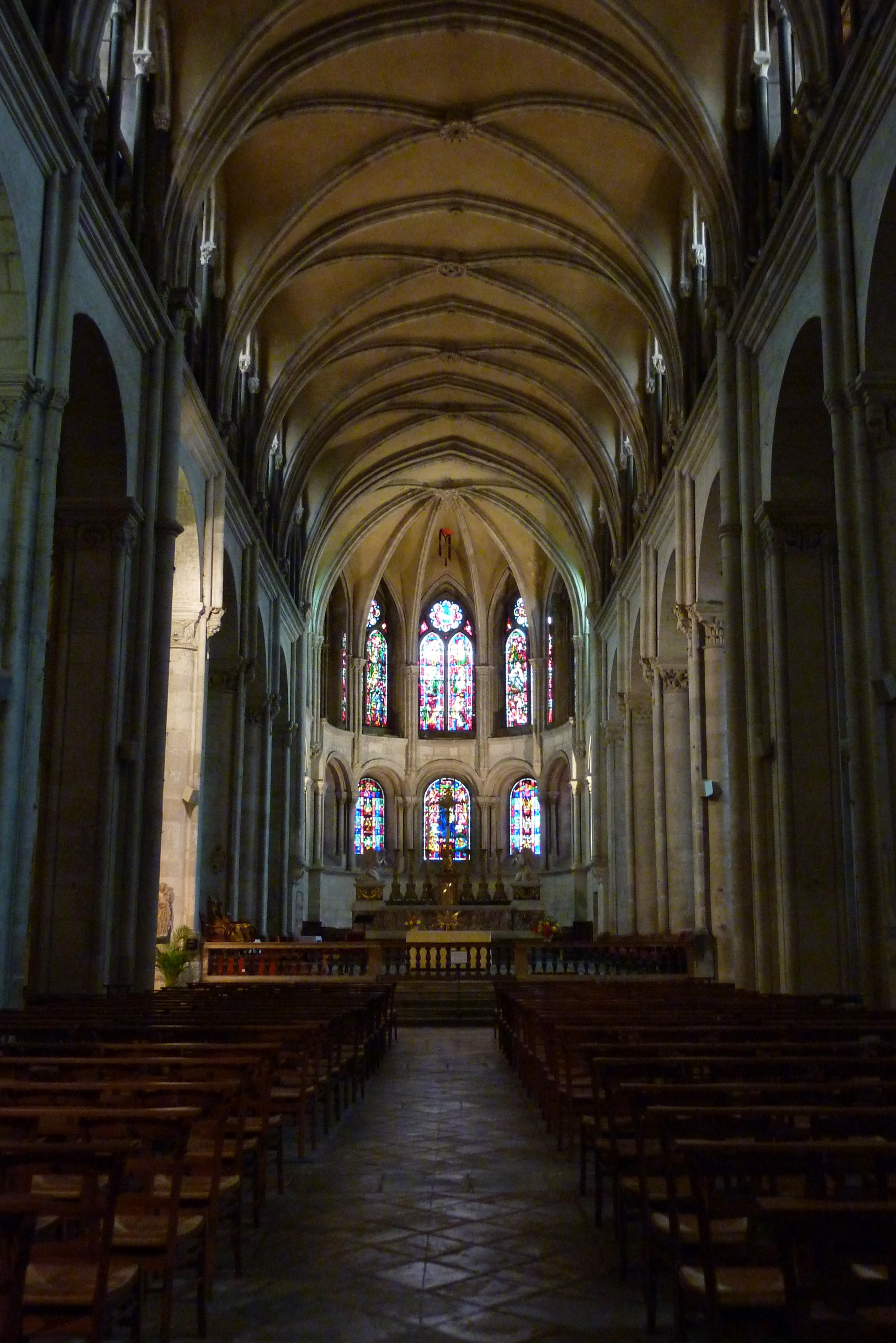 Kathedrale Saint-Jean in Besançon